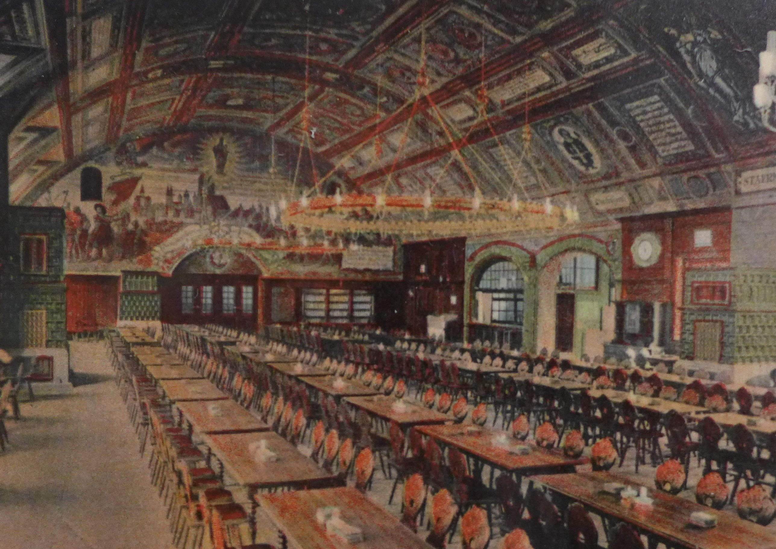 Hofbräuhaus am Platzl, Historische Ansicht des großen Saales des Hofbräuhauses auf einer Postkarte; an der Wandfläche das Gemälde "Patrona Bavariae" des Passauer Malers Ferdinand Wagner (1847-1927), Privatsammlung